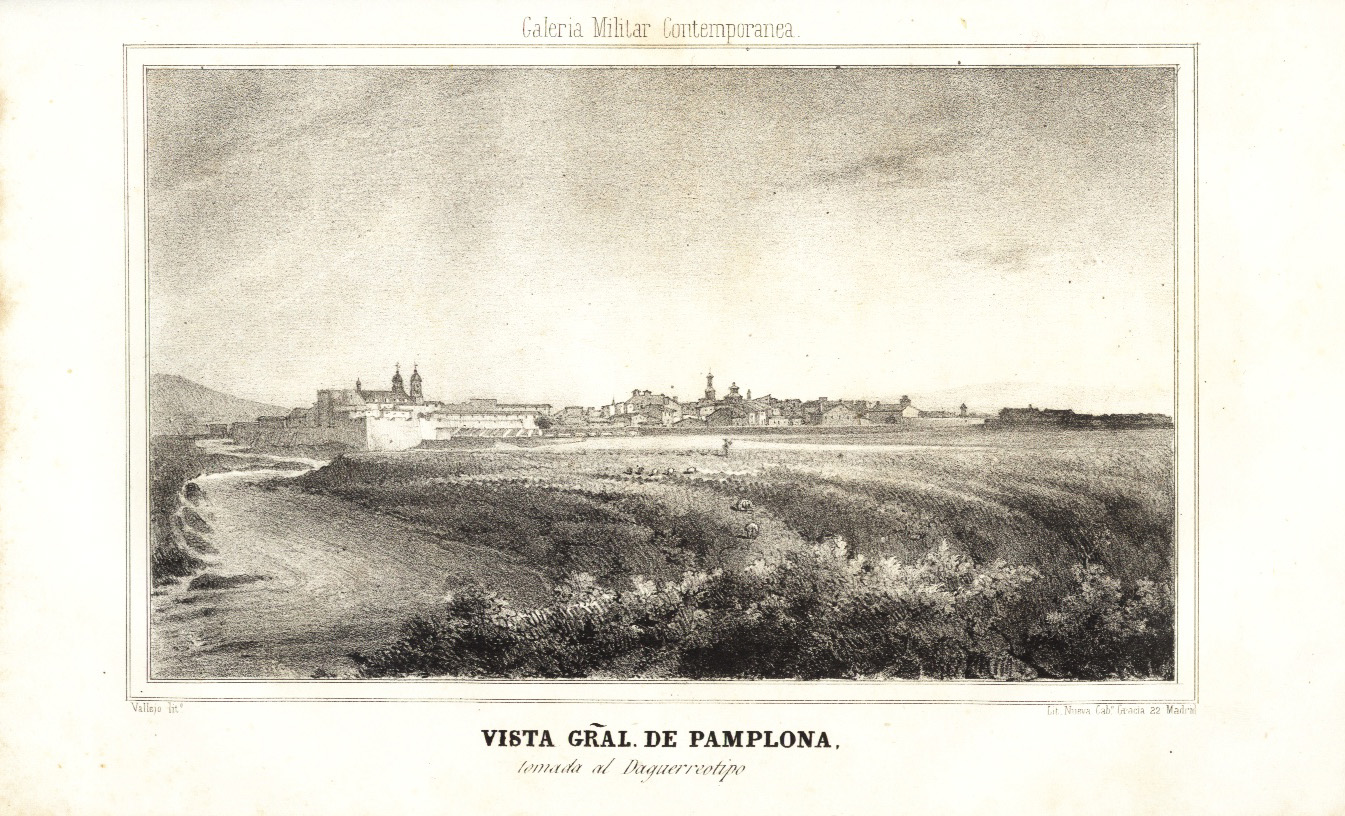 Vista general de Pamplona. "Galería Militar Contemporánea". Madrid 1846